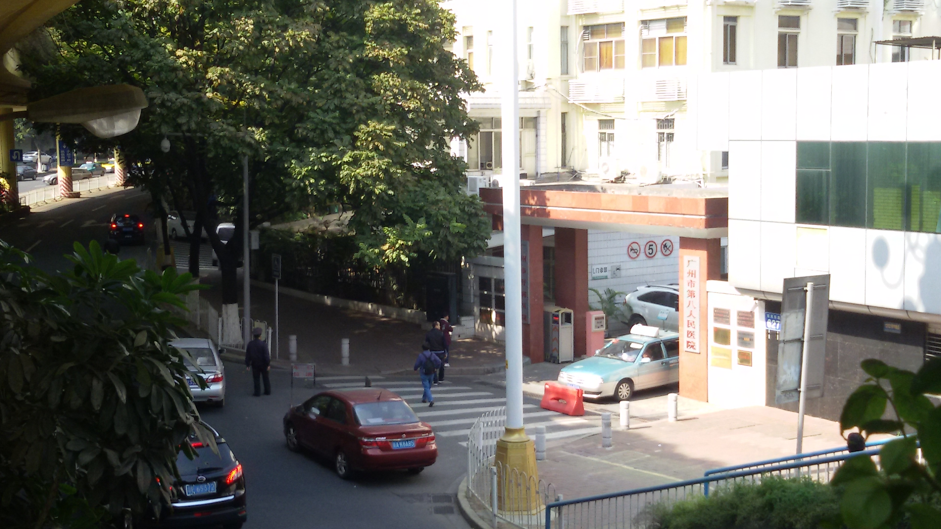 粵語: 廣州市第八人民醫院（東風院區）